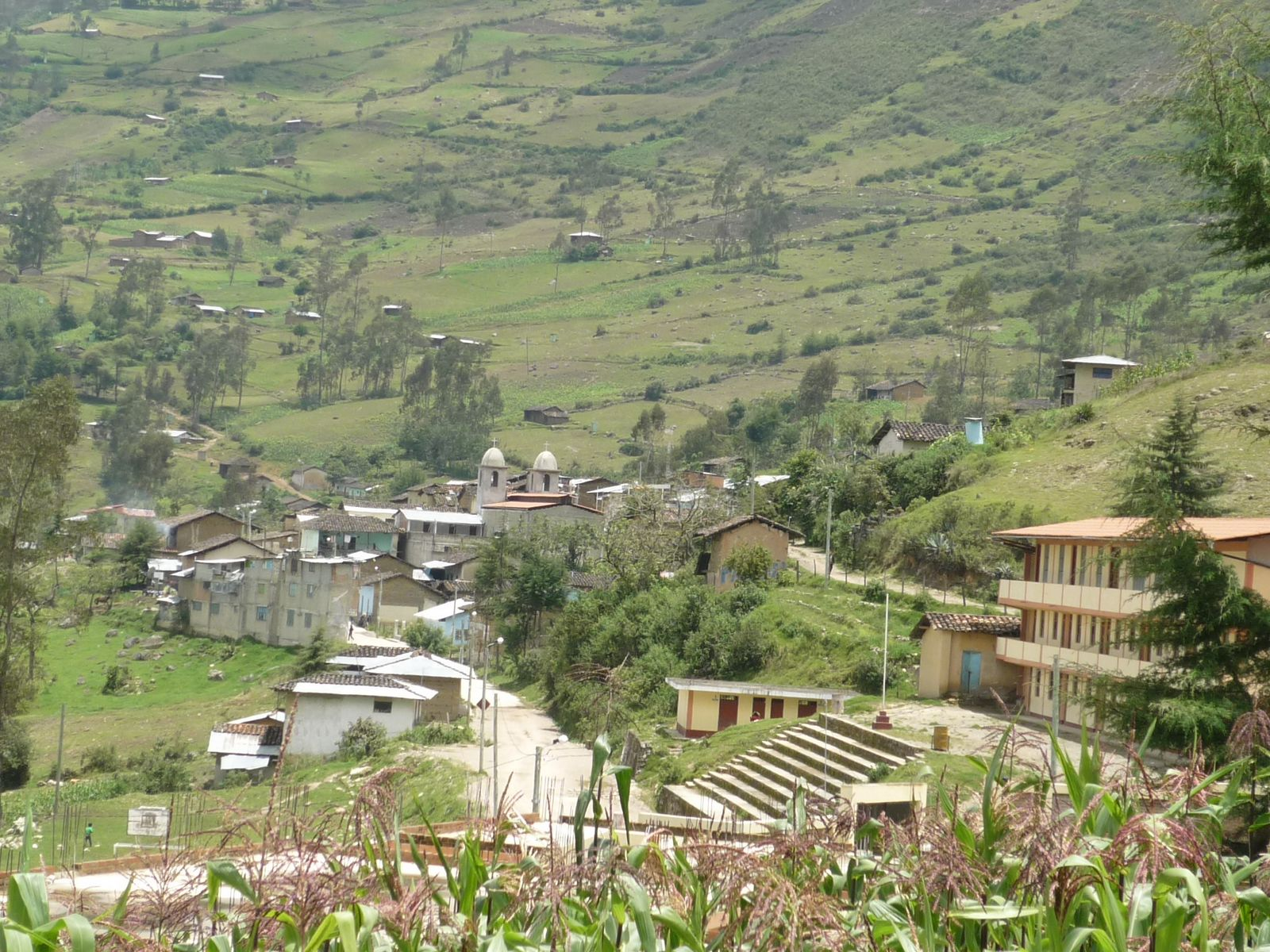 panorama Oxamarca